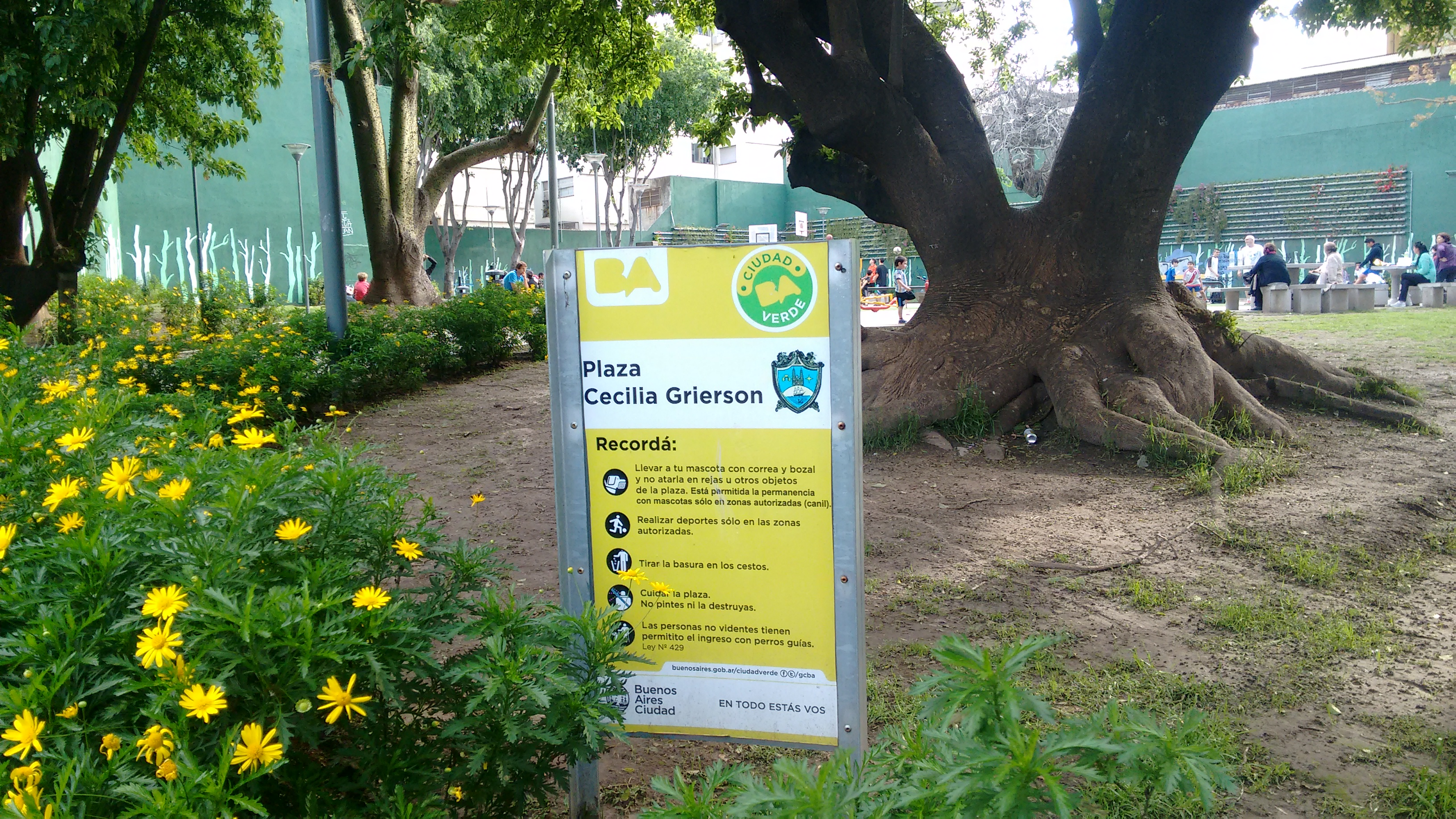 Cartel de Plaza Cecilia Grierson